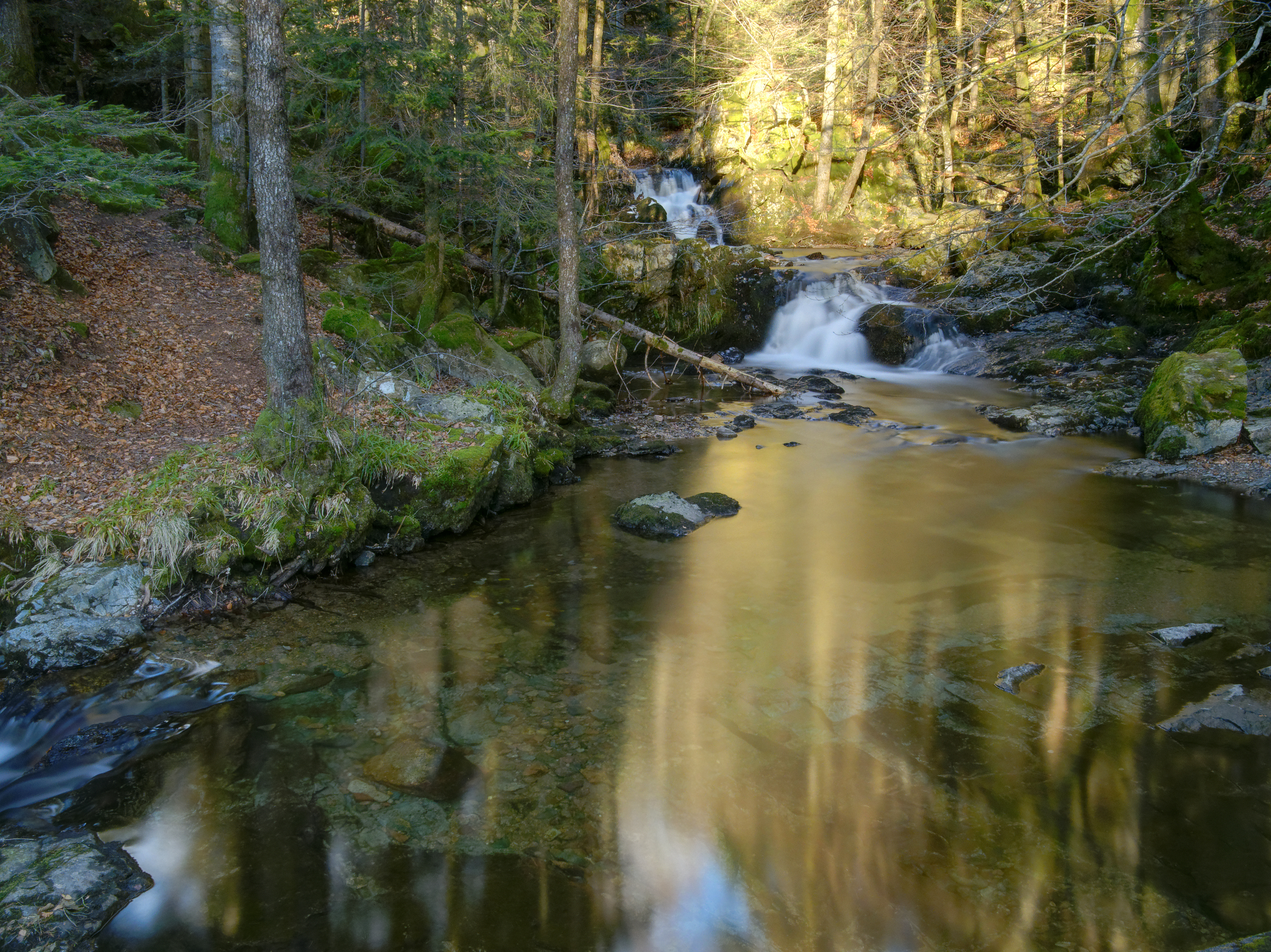 La Savoureuse à Lepuix. Photo réalisée avec un filtre ND400.